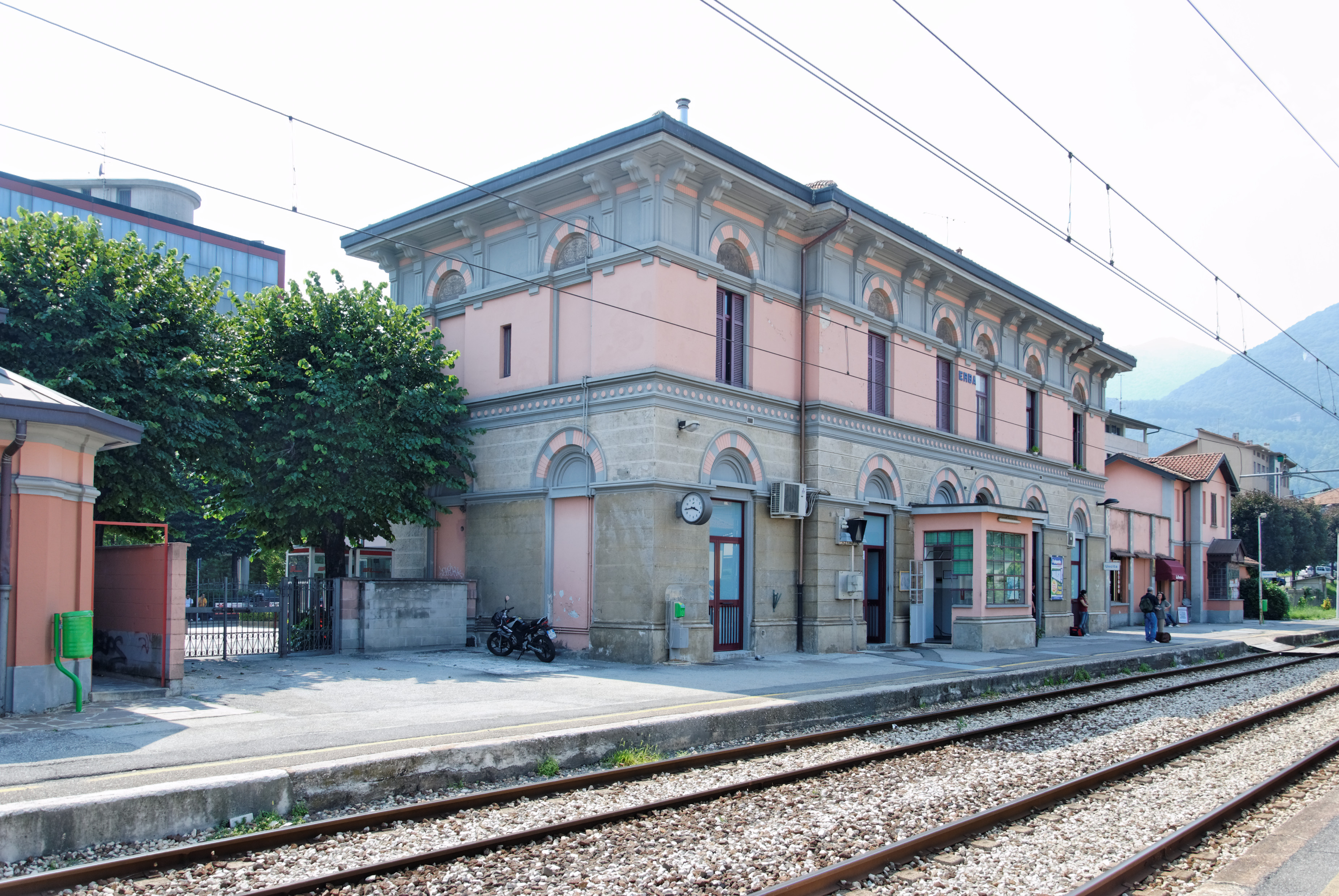 Stazione Ferrovienord di Erba (CO).